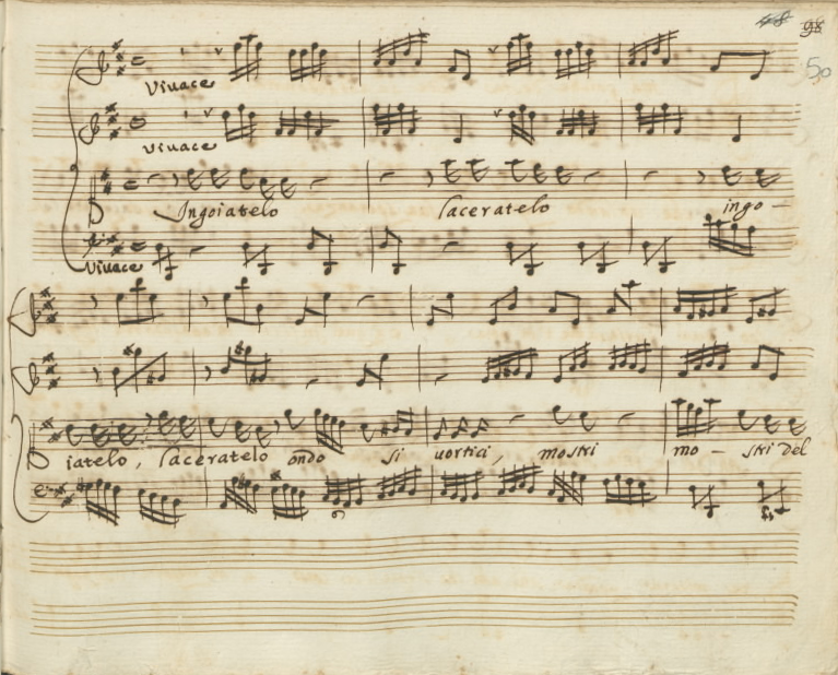 Page de l'Aria « Ingoiatelo, laceratelo » extrait de la cantate de chambre « L'Arianna » ou Ebra d'amor fuggia H.242 d'Alessandro Scarlatti (Ms. Naples, Rari 7.1.13, f° 50).